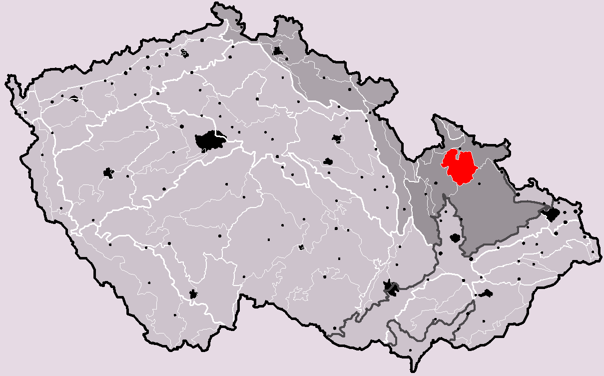 Poloha geomorfologického celku Hrubý Jeseník v rámci České republiky. Hercynský systém Hercynská pohoří I Česká vysočina I4 (IV) Krkonošsko-jesenická subprovincie I4C (IVC) Jesenická oblast I4C-7 (IVC-7) Hrubý Jeseník